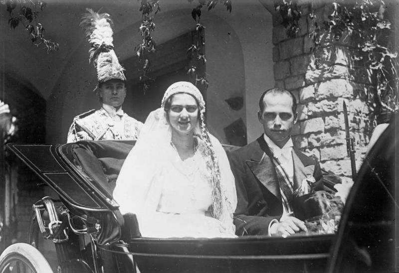 Die grosse Hochzeit im rumänischen Königshaus! Das glückliche Brautpaar nach der Trauung in der Galakutsche, Prinzessin Ileana und Herzog Anton von Habsburg.